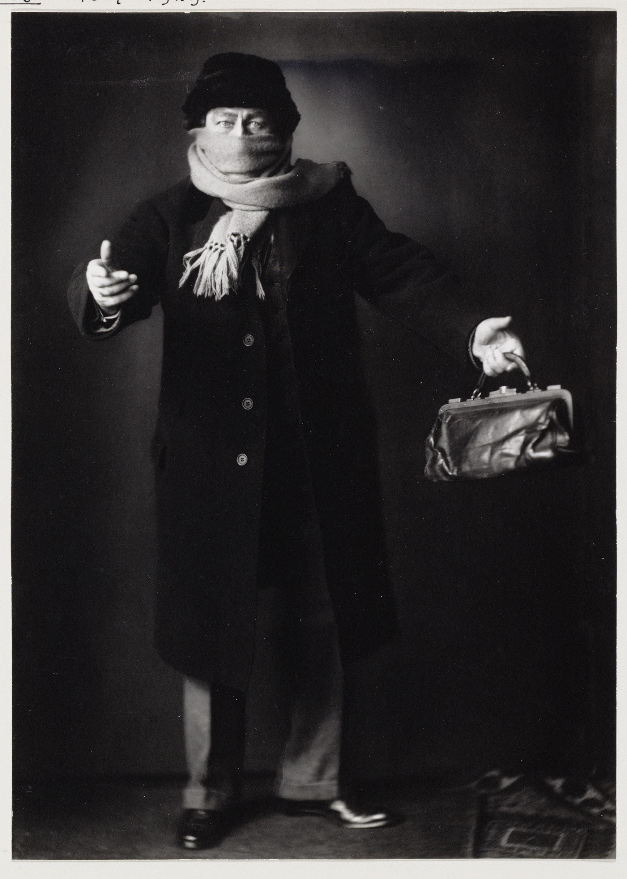 Beschrijving Dr. Willem Cornelis Royaards (1867-1929) Toneelspeler in Welkom Vreemdeling. Documenttype foto Vervaardiger Merkelbach, Atelier J. Collectie Collectie Atelier J. Merkelbach Datering 1922 Inventarissen Afbeeldingsbestand B00000002366 Generated with Dememorixer